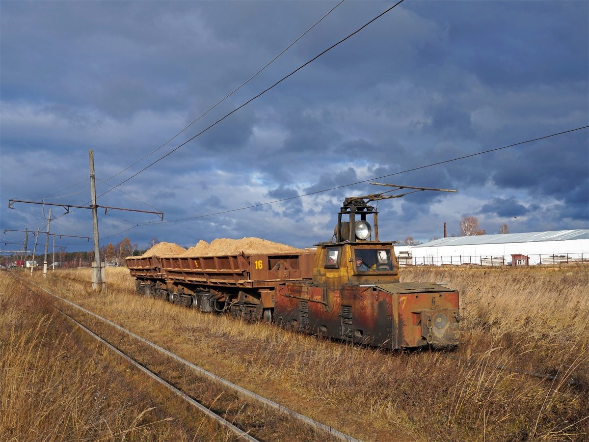 К14М №7 с грузовым поездом следует от переезда к заводу, УЖД Ивановского силикатного завода